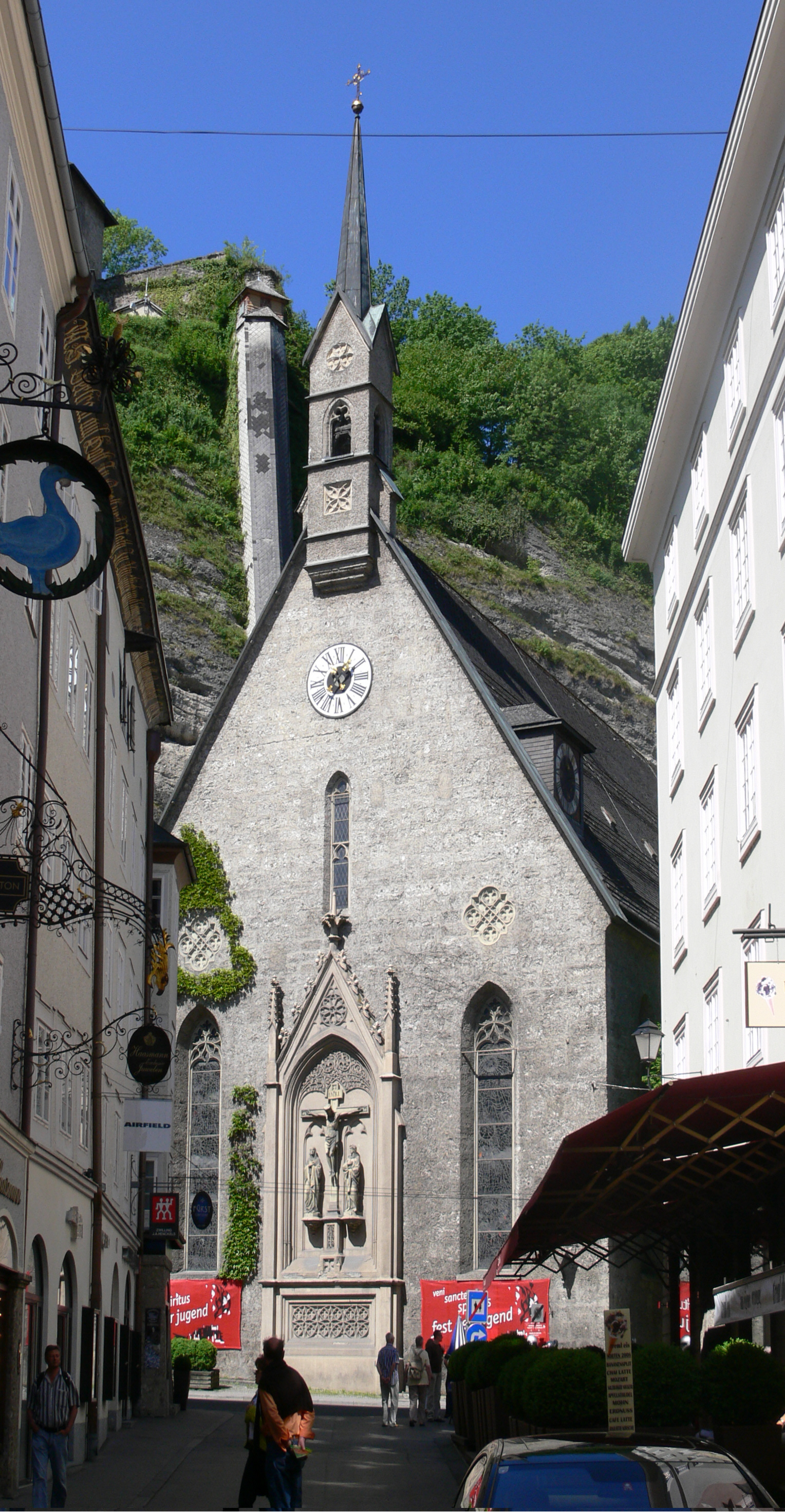 Salzburg, Getreidegasse und Blasiuskirche